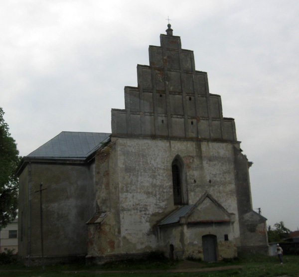 Kulików st. Nicholas latin church.jpg